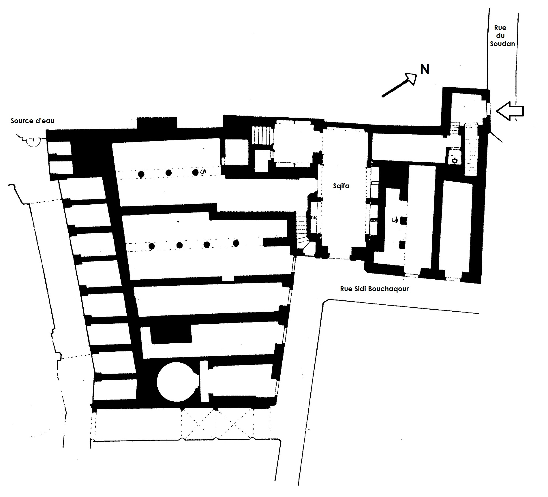 Plan du premier niveau du palais Dar Aziza. Jadis RDC, aujourd'hui sous-sol.